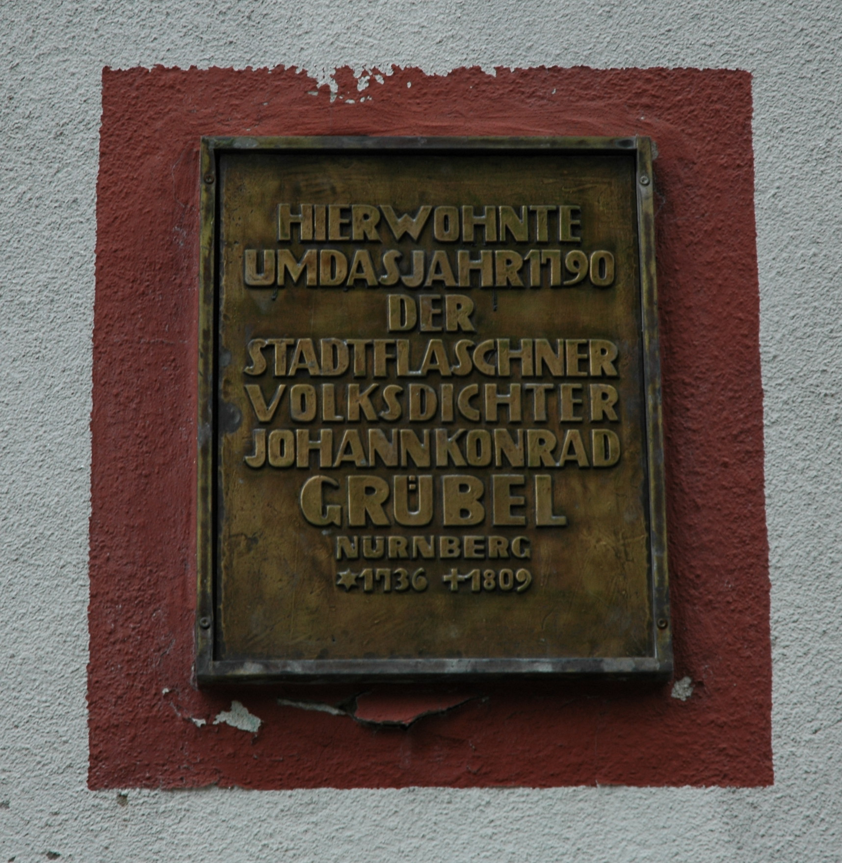 Gedenktafel für Konrad Grübel in Hohenstein, Gemeinde Kirchensittenbach